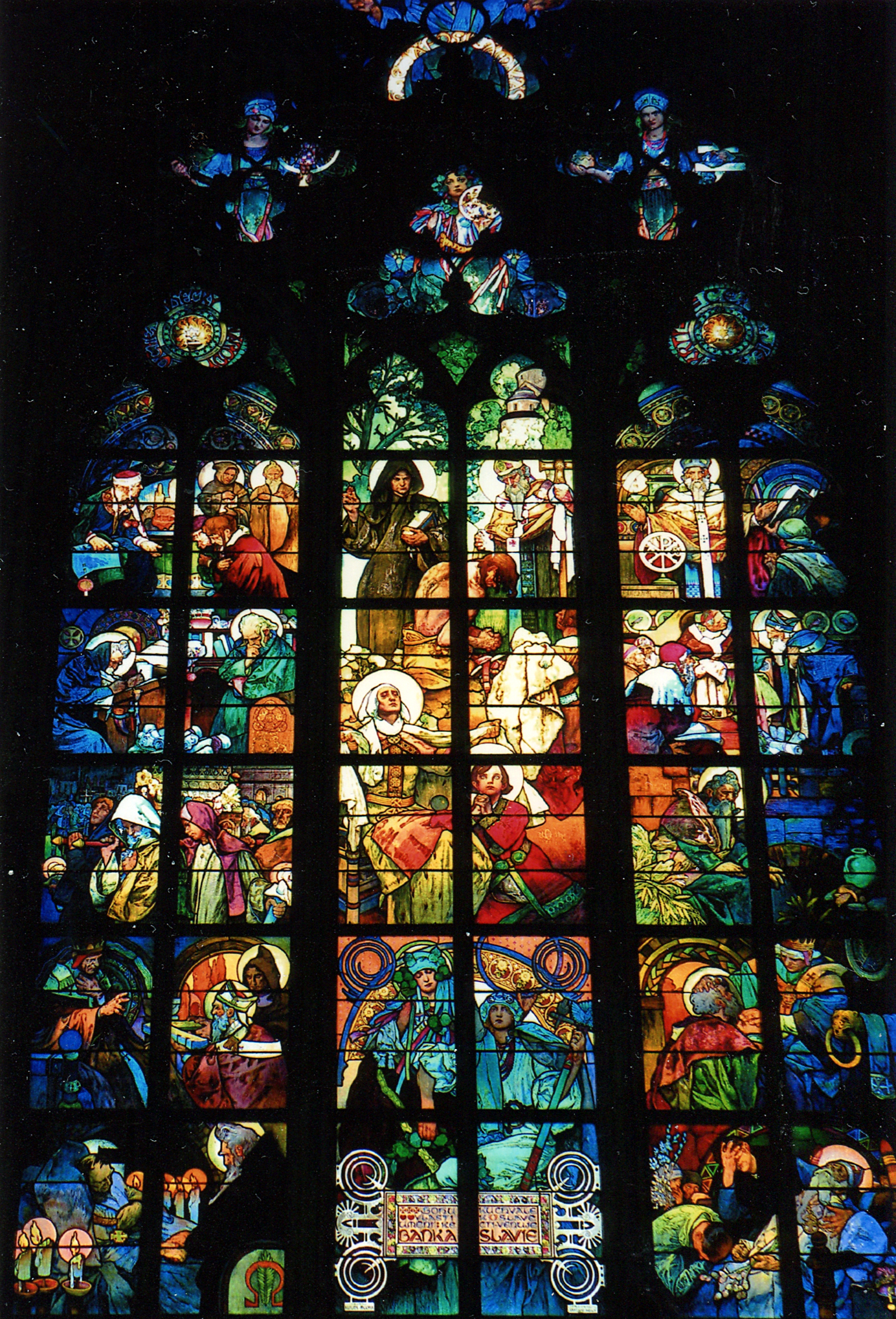 Прага.Собор св.Вита. Витраж